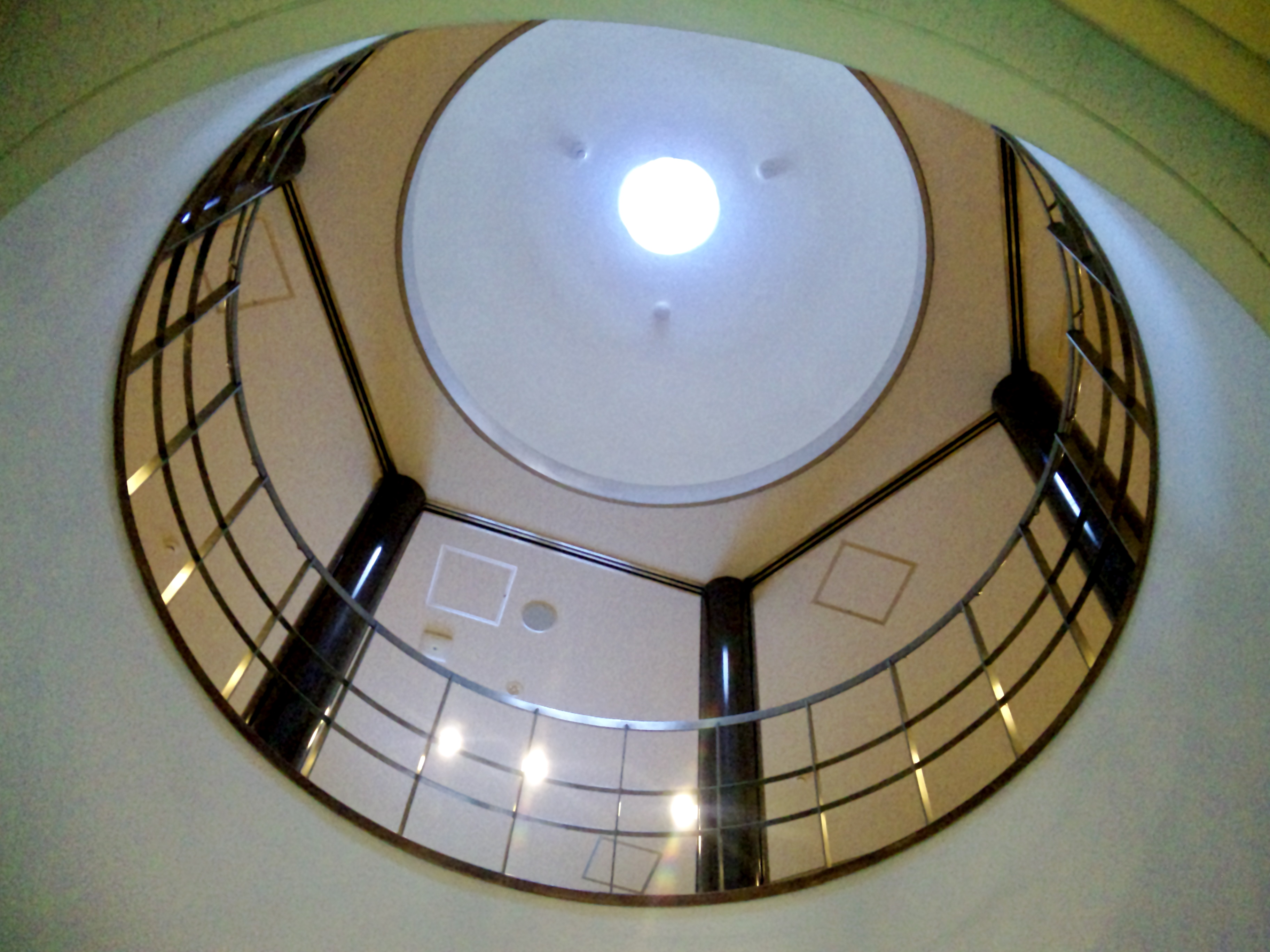 Un abat-jour de Hall Commémoratif Saionji à l'Université Ritsumeikan, Kyoto, le Japon